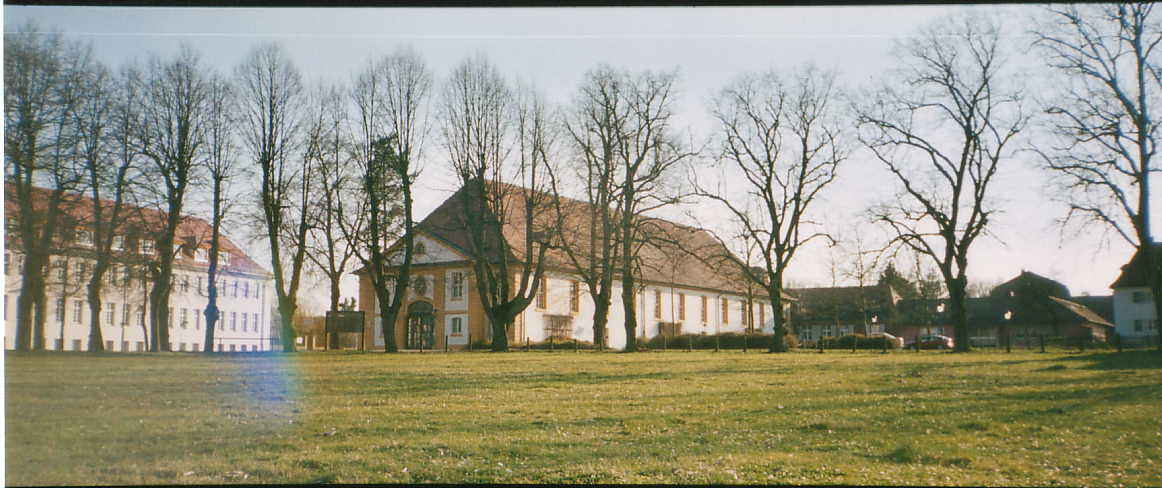 Altes Reithaus Triesdorf